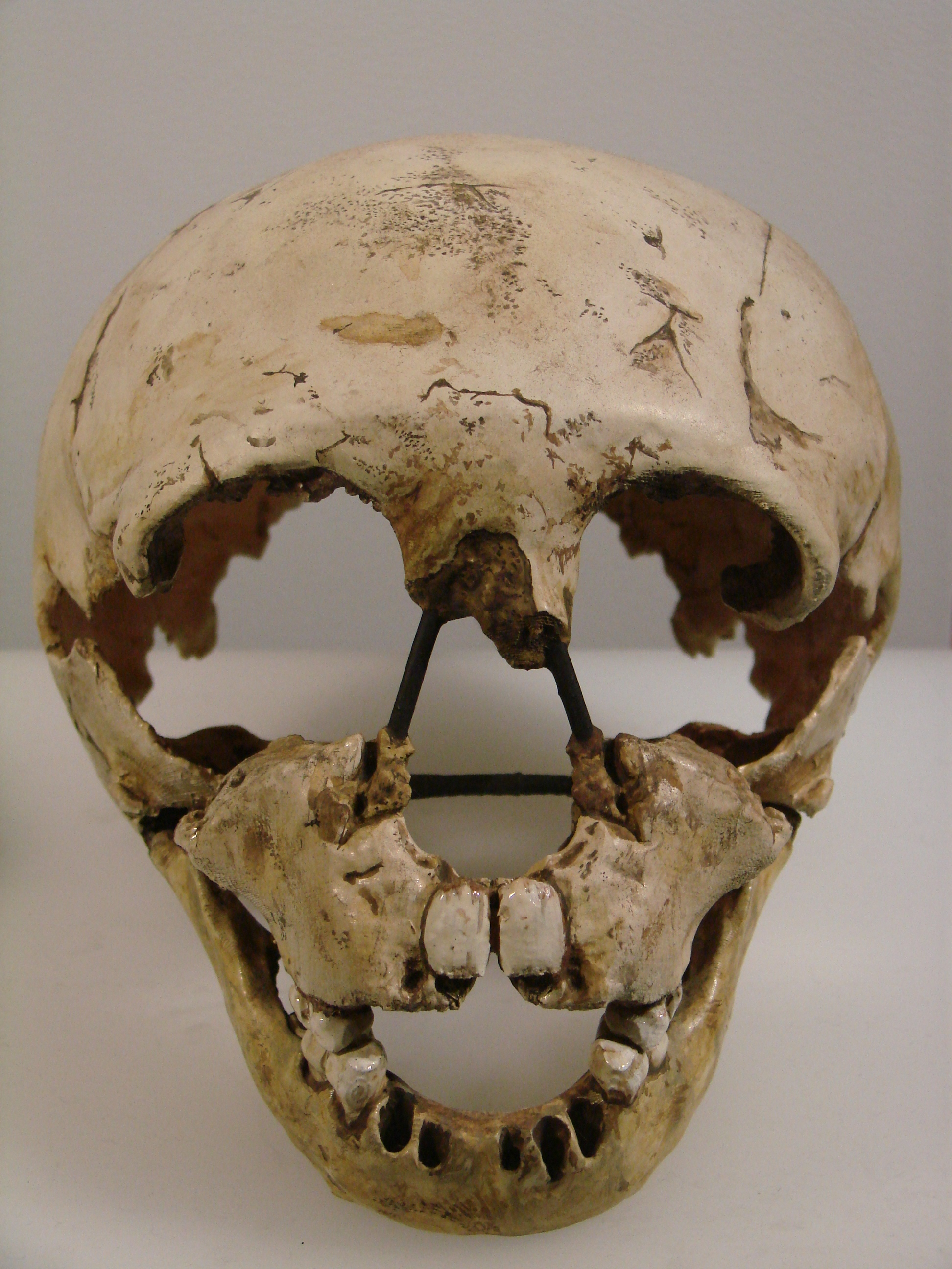 Muséum d'Anthropologie, campus universitaire d'Irchel, Université de Zurich (Suisse) : Homo neanderthalensis (Gibraltar)